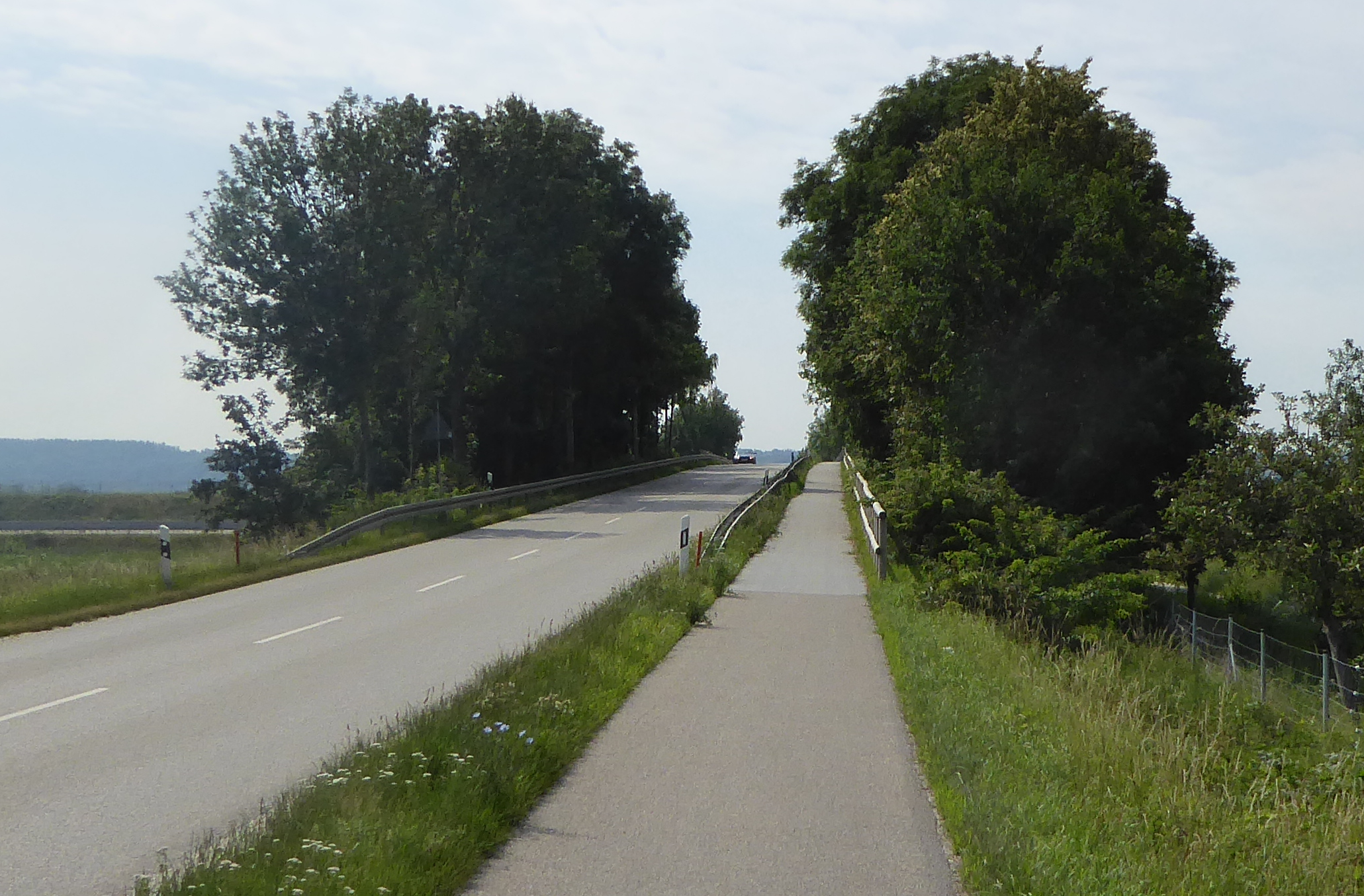 Verbindungsstraße LA 7 zwischen Essenbach in Richtung Ohu; Blick auf den Übergang über die Bundesautobahn 92